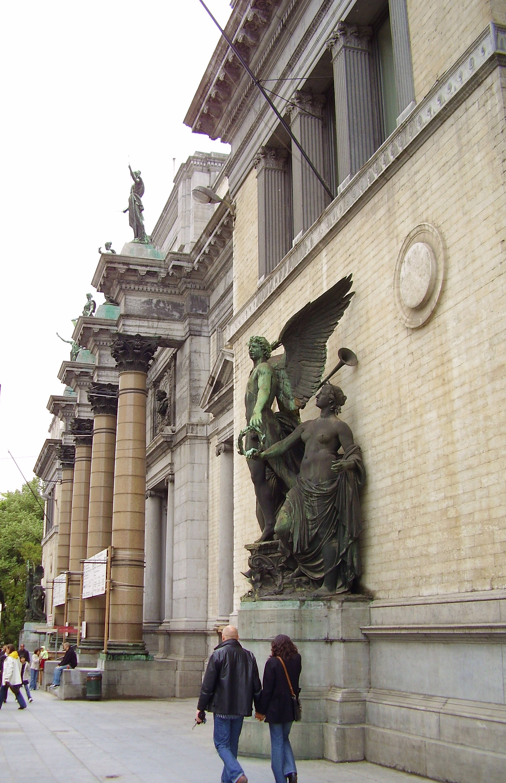 Musée royal d'art ancien à Bruxelles - rue de la Régence